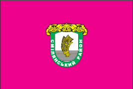 Прапор Смілянського району